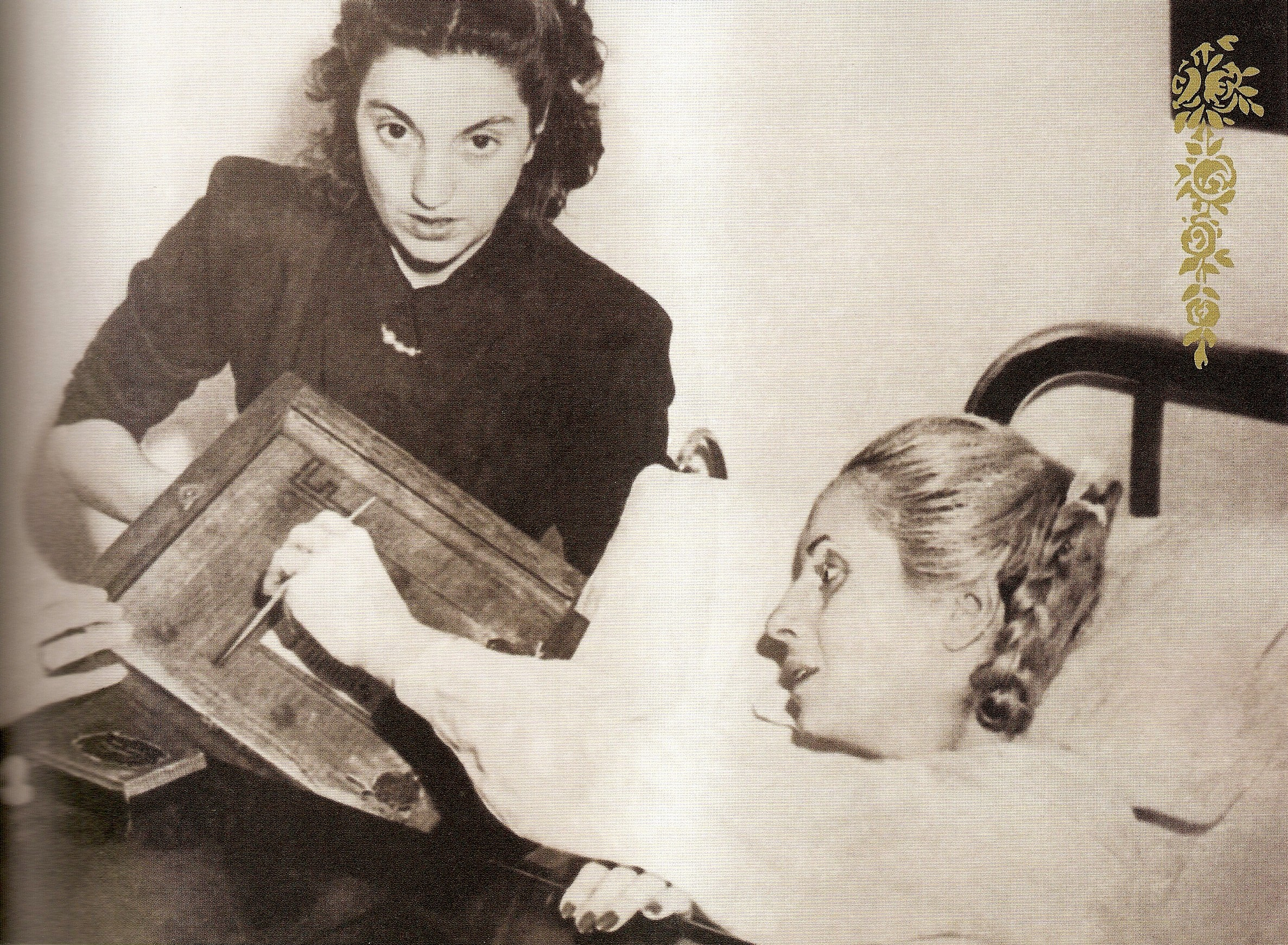 Eva Duarte de Perón (Evita). Votando en el Hospital de Avellaneda 1951